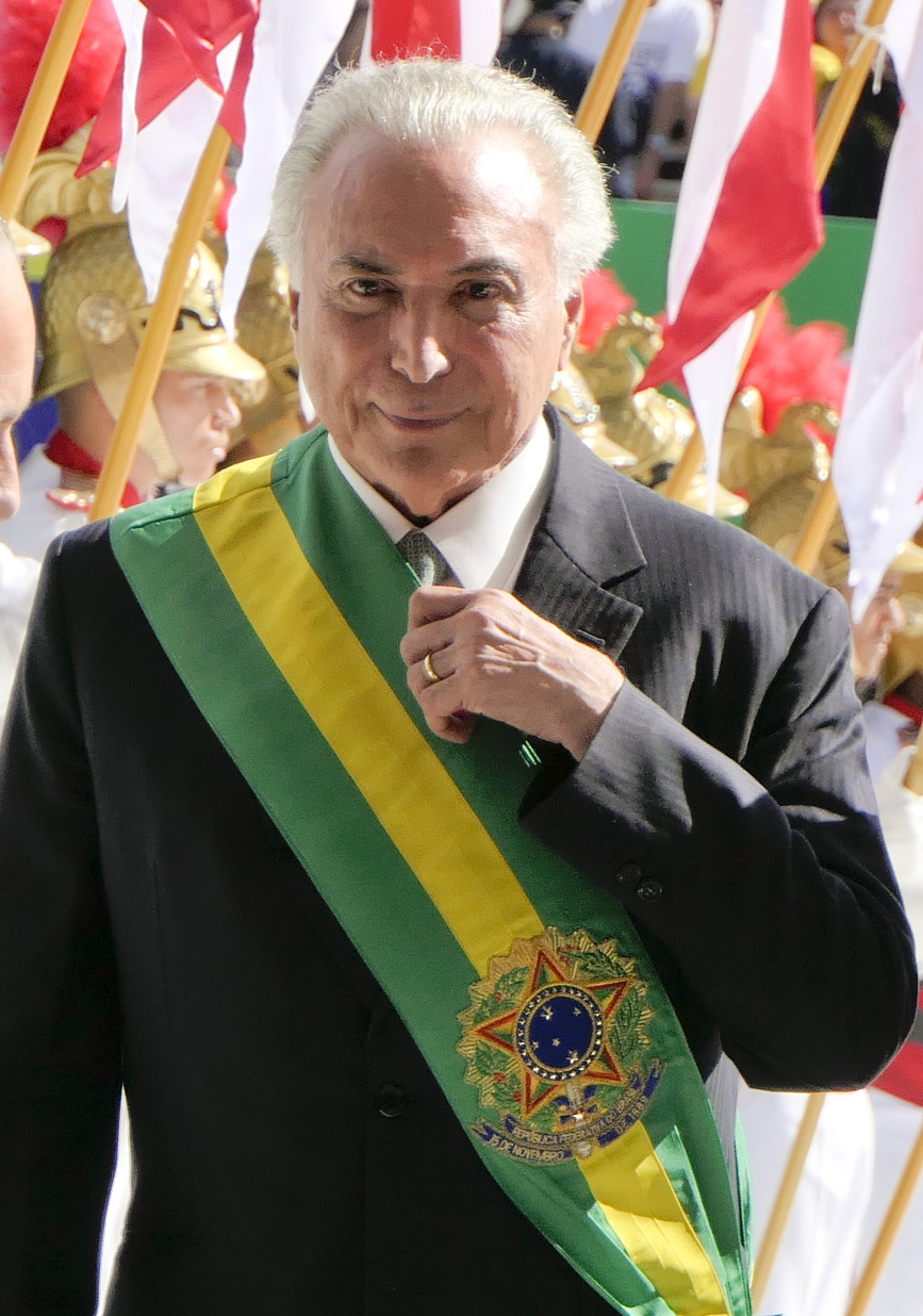 Solenidade de posse do presidente da República e do vice-presidente eleitos. Michel Temer e sua esposa, Marcela Temer aguardam o presidente da República para transmitir a faixa presidencial. Foto: Roque de Sá/Agência Senado